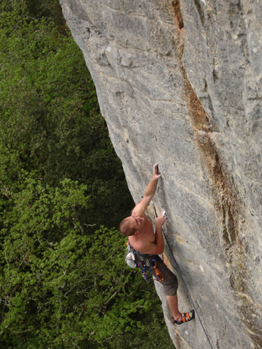 Jean Roussie